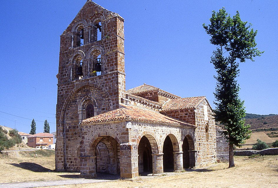 Iglesia románica de San Salvador de Cantamuda (Palencia). Original en diapositiva de 35 mm. tomada en agosto de 1991.